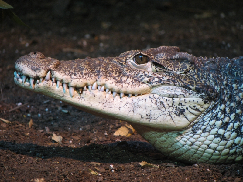 Cuban Crocodile